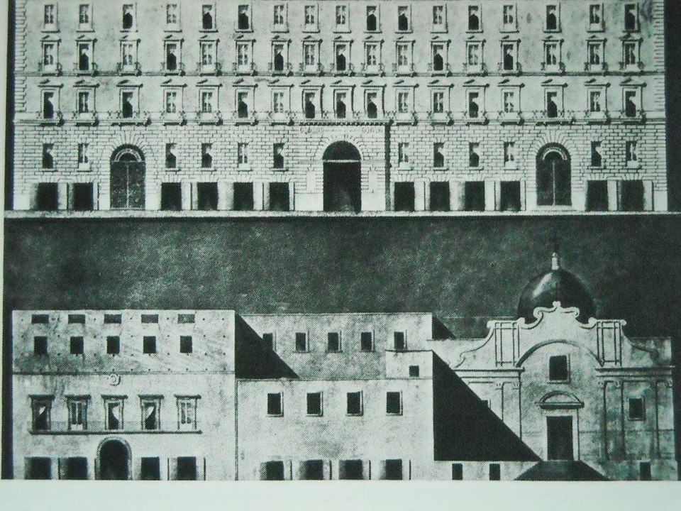 Napoli - Prospetto di Palazzo San Giacomo e della Chiesa S. Giacomo degli Spagnoli prima e dopo la sistemazione a Palazzo dei Ministeri Borbonici. Disegno di autore sconosciuto.